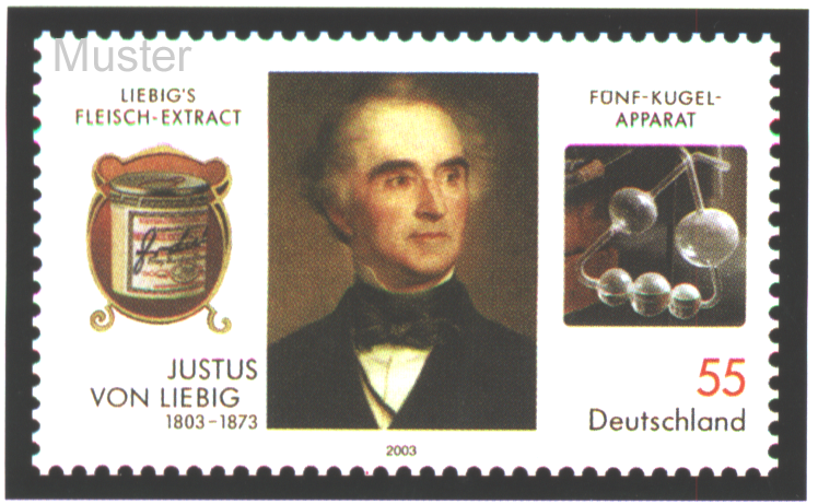 Briefmarke der Deutschen Post AG zum 200. Geburtstag von Justus Freiherr von Liebig